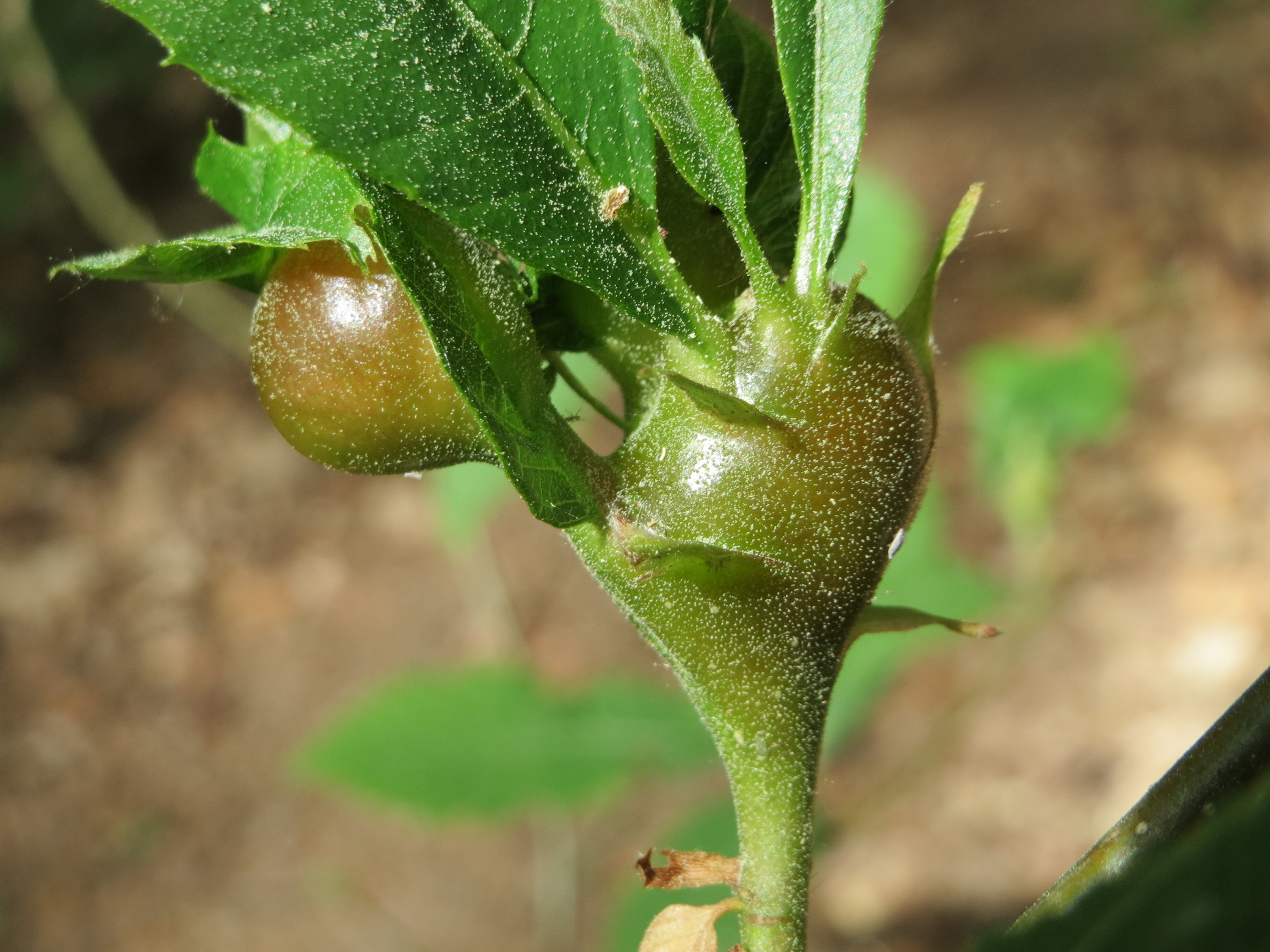 Gallen einer Kastaniengallwespe (Dryocosmus kuriphilus) an einer Edelkastanie (Castanea sativa) auf dem Feldherrenhügel (Naturschutzgebiet Oftersheimer Dünen)